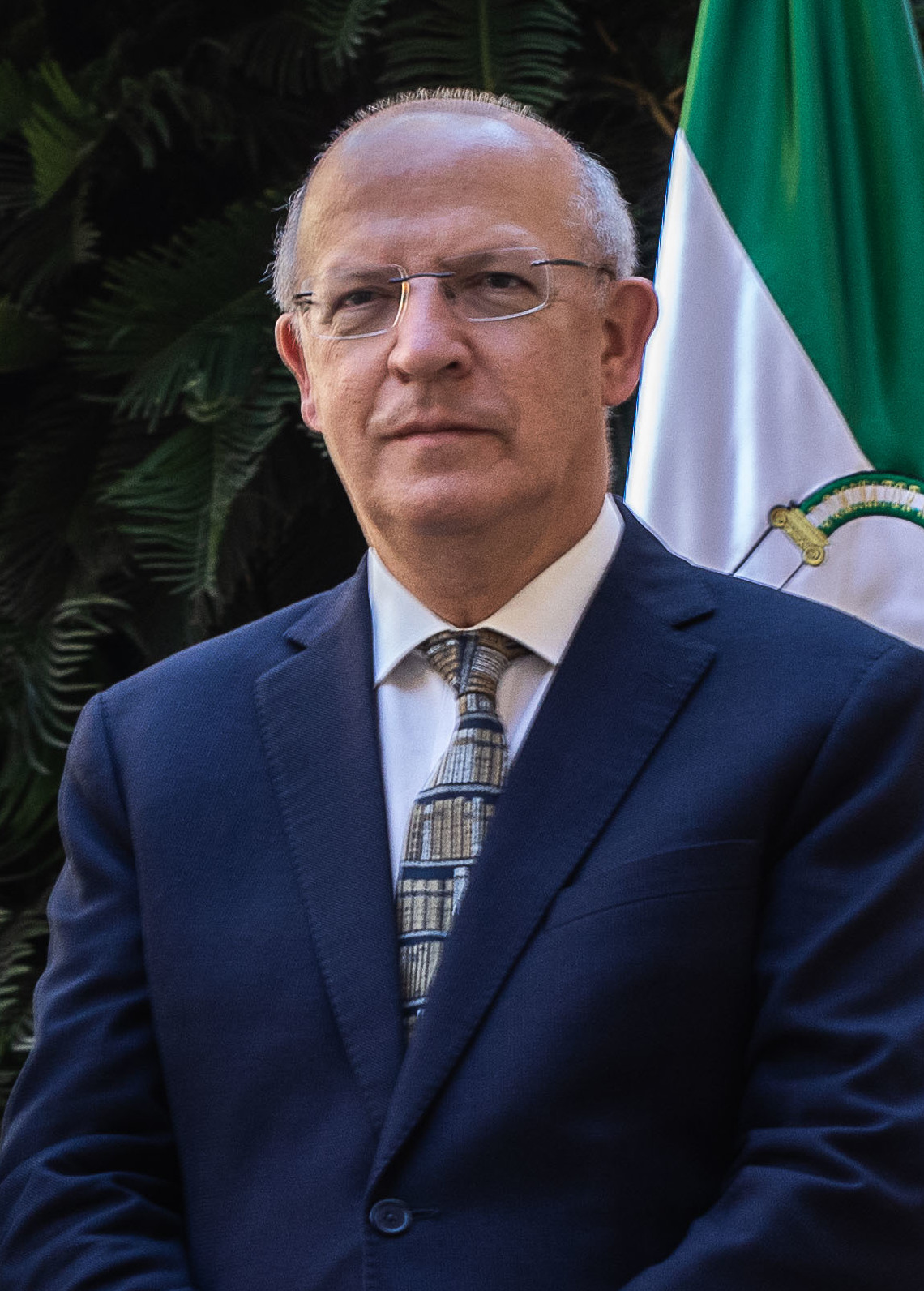 El presidente de la Junta de Andalucía, Juanma Moreno, recibe al Ministro de Asuntos Exteriores de Portugal, Augusto Santos Silva. La recepción ha tenido lugar en el Palacio de San Telmo. Fotografía oficial de la Junta de Andalucía. Se pone a disposición solamente para su publicación por las organizaciones de noticias y/o para la impresión de uso personal por parte del sujeto o sujetos de la fotografía. La fotografía no puede ser manipulada de ninguna manera y no se puede utilizar en materiales comerciales o políticos, anuncios, productos o promociones que de alguna manera sugieran aprobación o respaldo de la Junta de Andalucía.